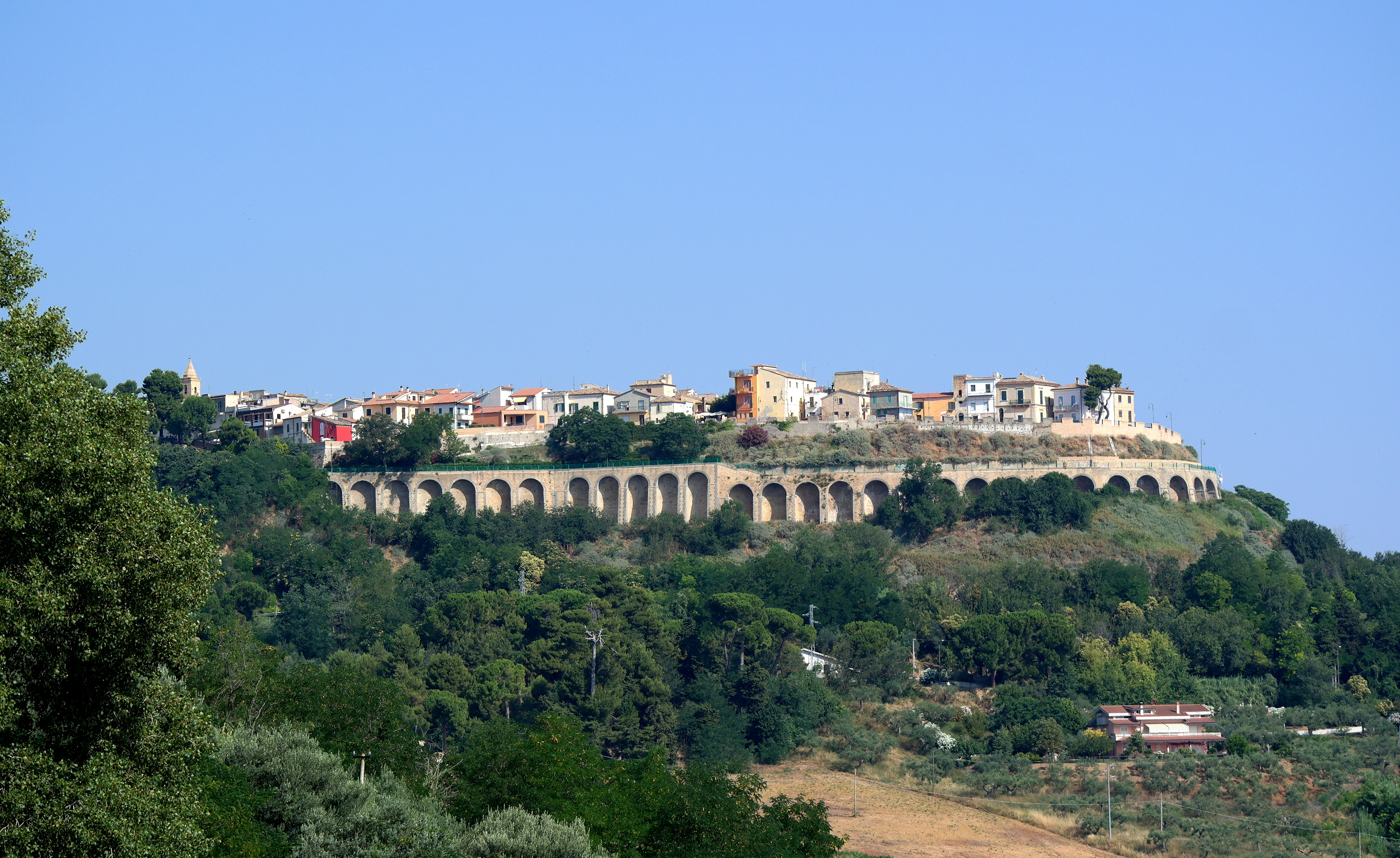 Veduta di Silvi paese